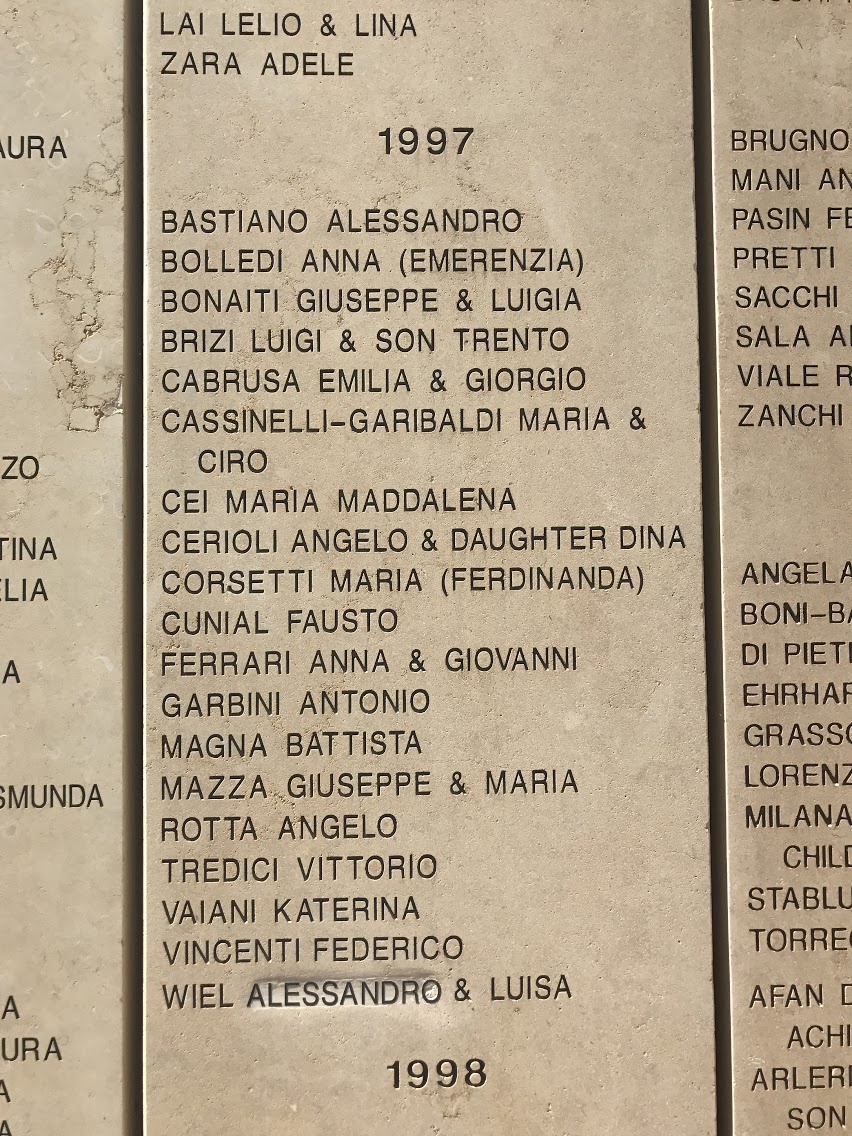 שמם של לואיג'י בריצי ובנו טרנטו על קיר הכבוד לחסידי אומות העולם, בגן חסידי אומות העולם שביד ושם, ירושלים.